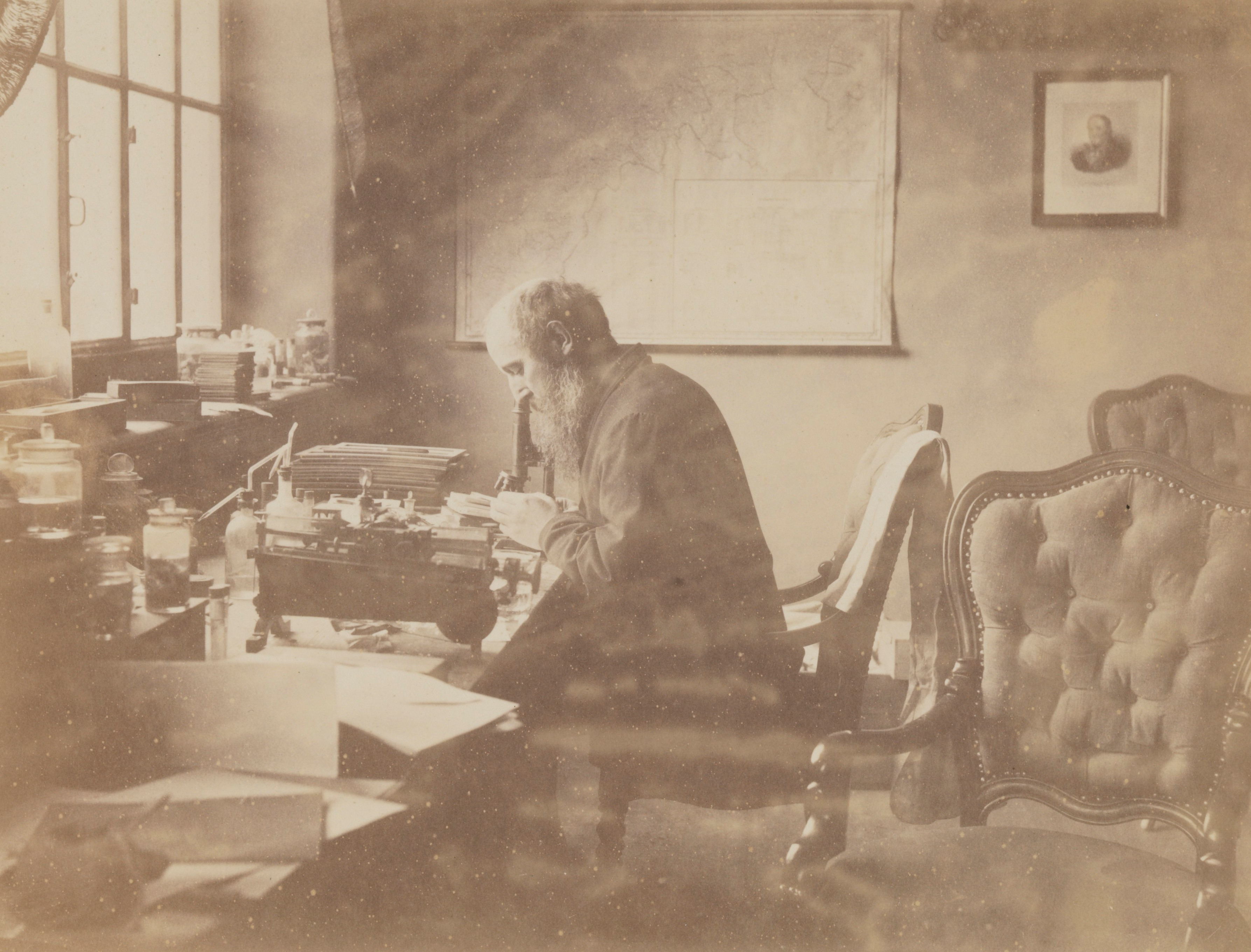 Gerhard Henrik Armauer Hansen, lege og naturforsker, ved mikroskopet i Bergens Museum. Med dedikasjon. Depicted person: Hansen, Gerhard Henrik Armauer (1841-1912) Depicted place: Bergen